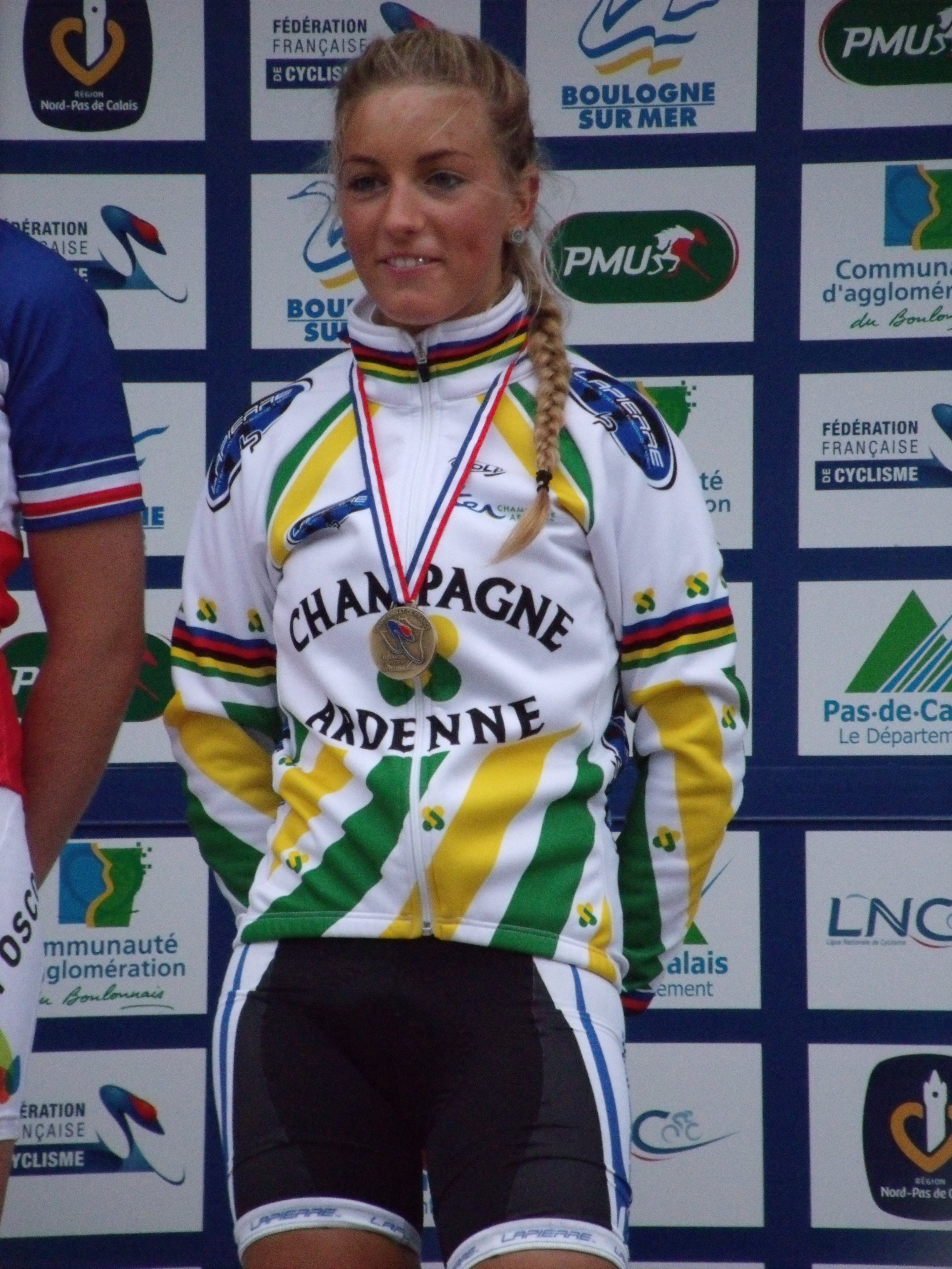 Pauline Ferrand-Prévot sur le podium du championnat de France sur route espoirs 2011